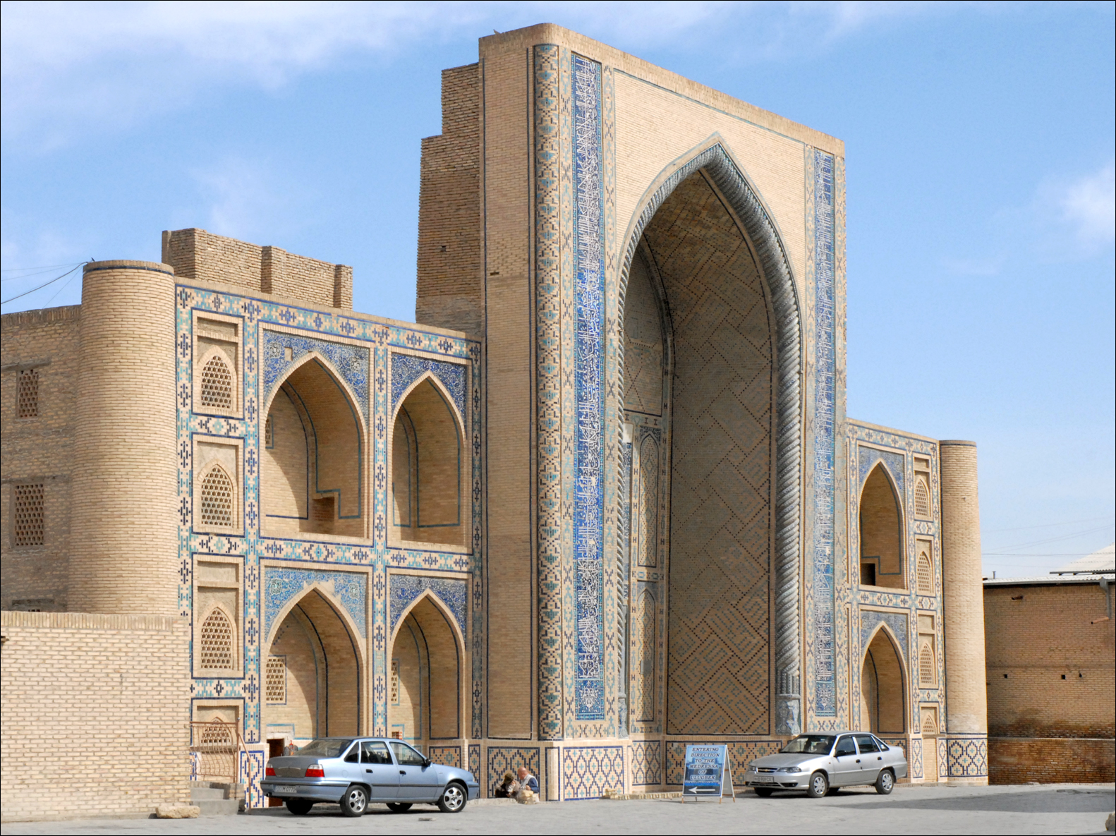 La médersa Ouloug Beg est la première médersa construite sous son règne en 1417. Une inscription à l'entrée indique : "la recherche du savoir est un devoir sacré de tous les musulmans, hommes et femmes." L'architecte était un persan, appelé "Ismaïl, fils de Tahir, fils du maître artisan Mahmoud d'Ispahan". La mosquée a été restaurée en 1994. Elle fait face à la médersa Abdoul Aziz Khan (1652)